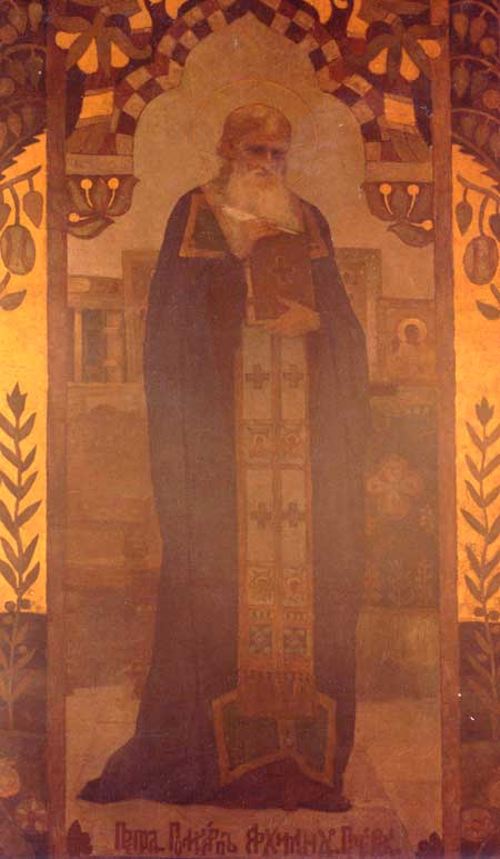 Saint Polycarp, hegumen of Kyiv Caves Monastery, Ukraine (d. 1182) Полікарп, архімандрит Печерський - ? - 6 серпня 1182 р. Архімандрит Печерського монастиря (1164-1183). Преподобний. Пам'ять 11 жовтня і 6 серпня. Замолоду був наближений до князя Святослава Ольговича; вів господарчі записи, брав участь у дипломатичних місіях. Близько 1156-1163 рр. постригся у Печерському монастирі. За благословенням ігумена Акіндіна продовжує печерське літописання (доведене до початку 70-х років ХІІ ст.) Близько 1164-1165 рр. обраний ігуменом. Брав активну участь у богословській дискусії про піст - чи необхідний піст у середу і п'ятницю, коли на них припадає свято. Товаришував з київським князем Ростиславом Мстиславичем (1159-1167), який навіть збирався постригтися в його обителі. У 1171 р. першим з печерських ігуменів одержав сан архімандрита. Варто відрізняти архімандрита Полікарпа від його тезки (жив у ХІІІ ст.), ченця того ж монастиря й одного з авторів "Патерика Печерського". Його мощі спочивають у Ближніх печерах.